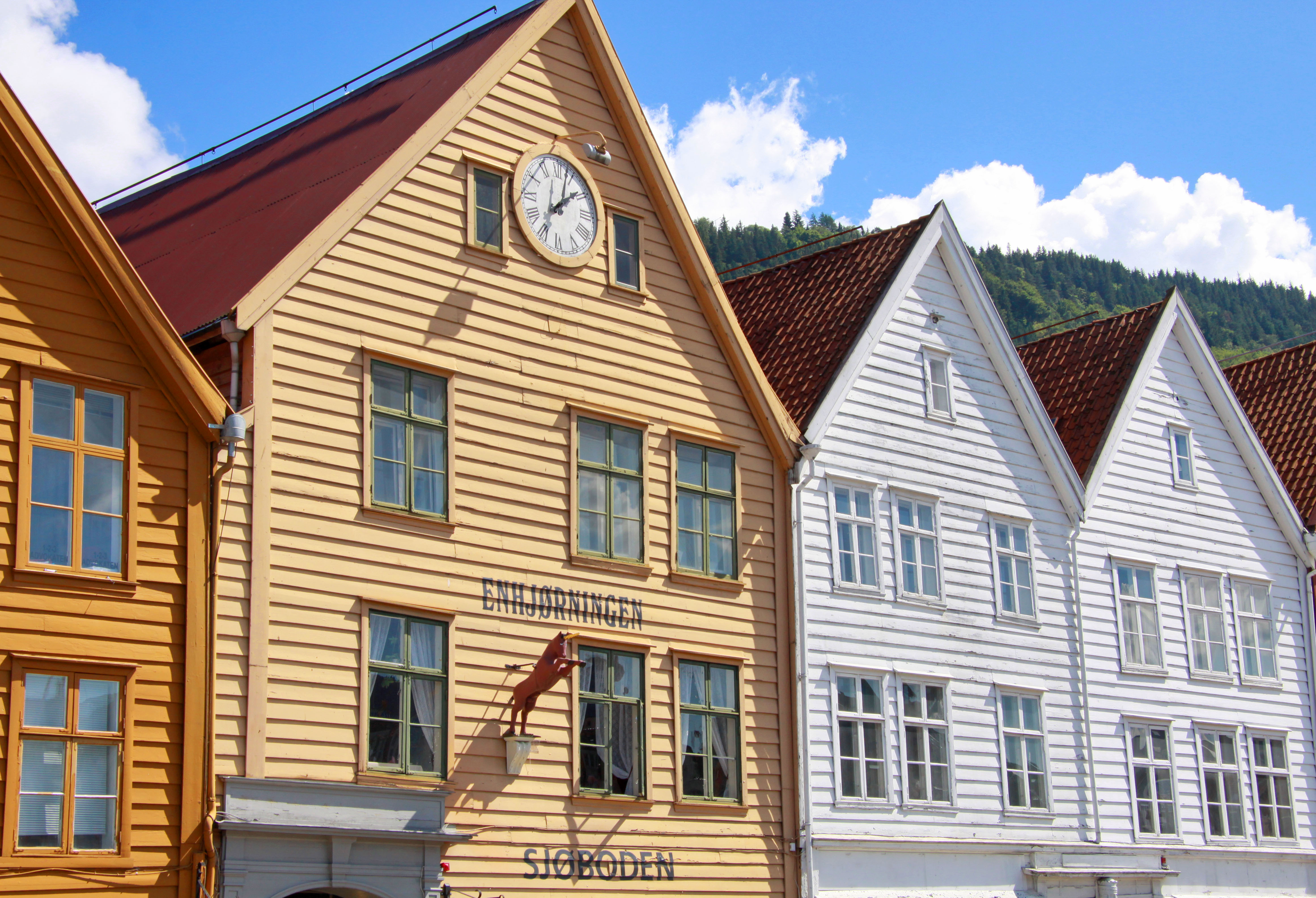 Enhjørningsgården, Bryggen i Bergen